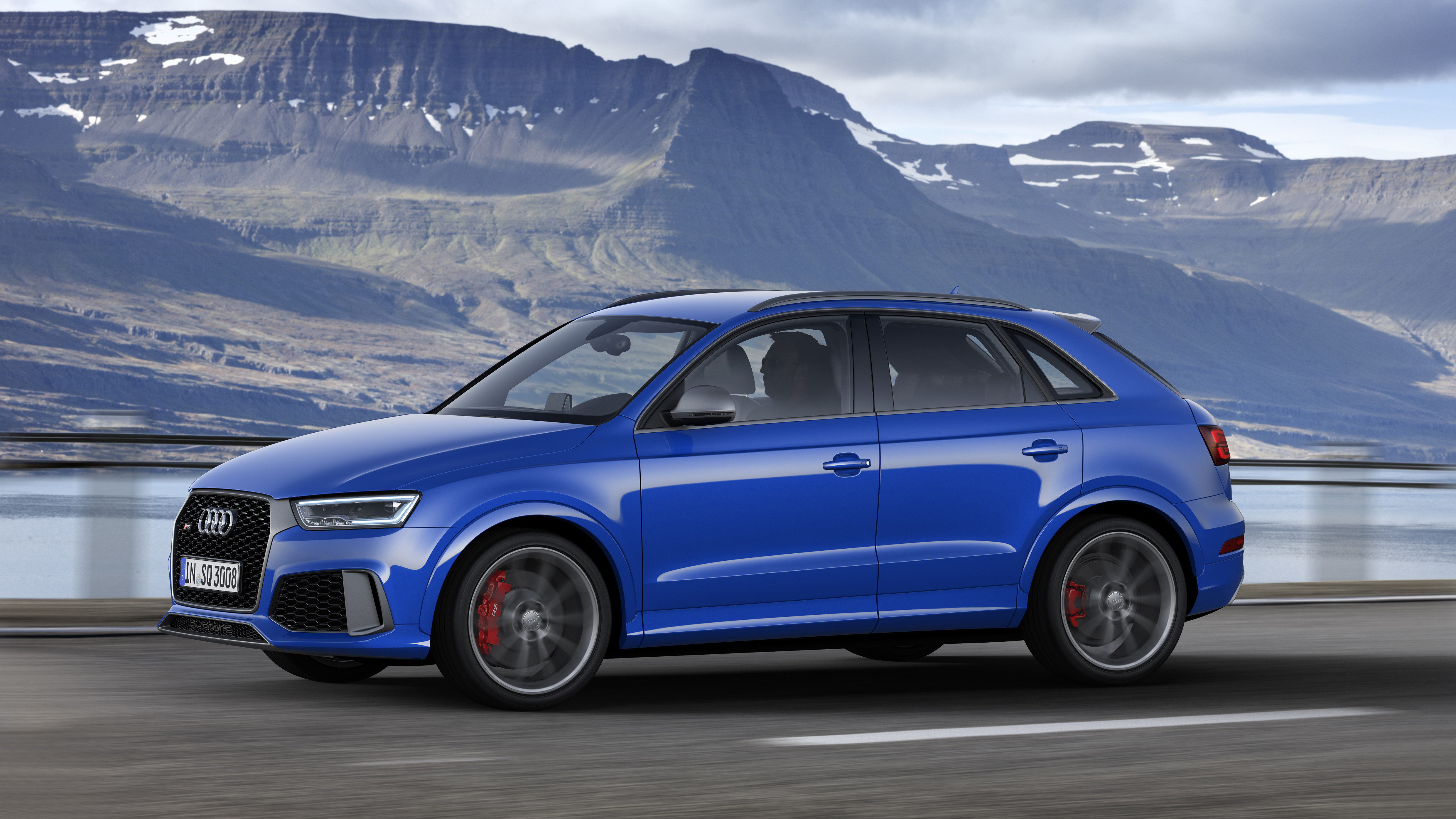 Farbe: Ascariblau Metallic ———————————— Kraftstoffverbrauch kombiniert in l/100 km: 8,6 - 8,4; CO2-Emission kombiniert in g/km: 203 - 198. Angaben zu den Kraftstoffverbräuchen und CO2-Emissionen sowie Effizienzklassen bei Spannbreiten in Abhängigkeit vom verwendeten Reifen-/Rädersatz.